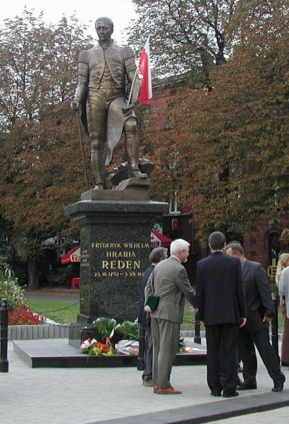 Pomnik Hr. Redena. Chorzów, 2005.09.06 zdjęcie własne